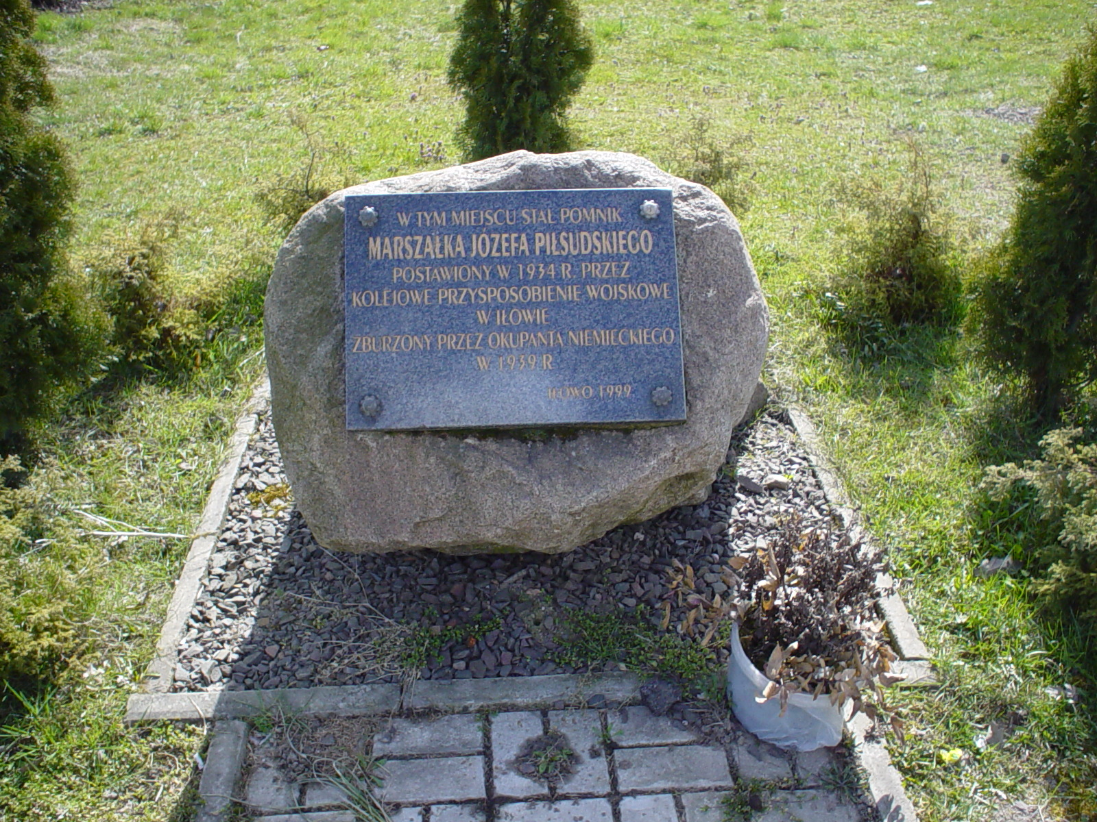 Tablica pamiątkowa - tu stał kiedyś pomnik Marszałka Józefa Piłsudskiego. Iłowo-Osada, powiat działdowski, woj. warmińsko-mazurskie